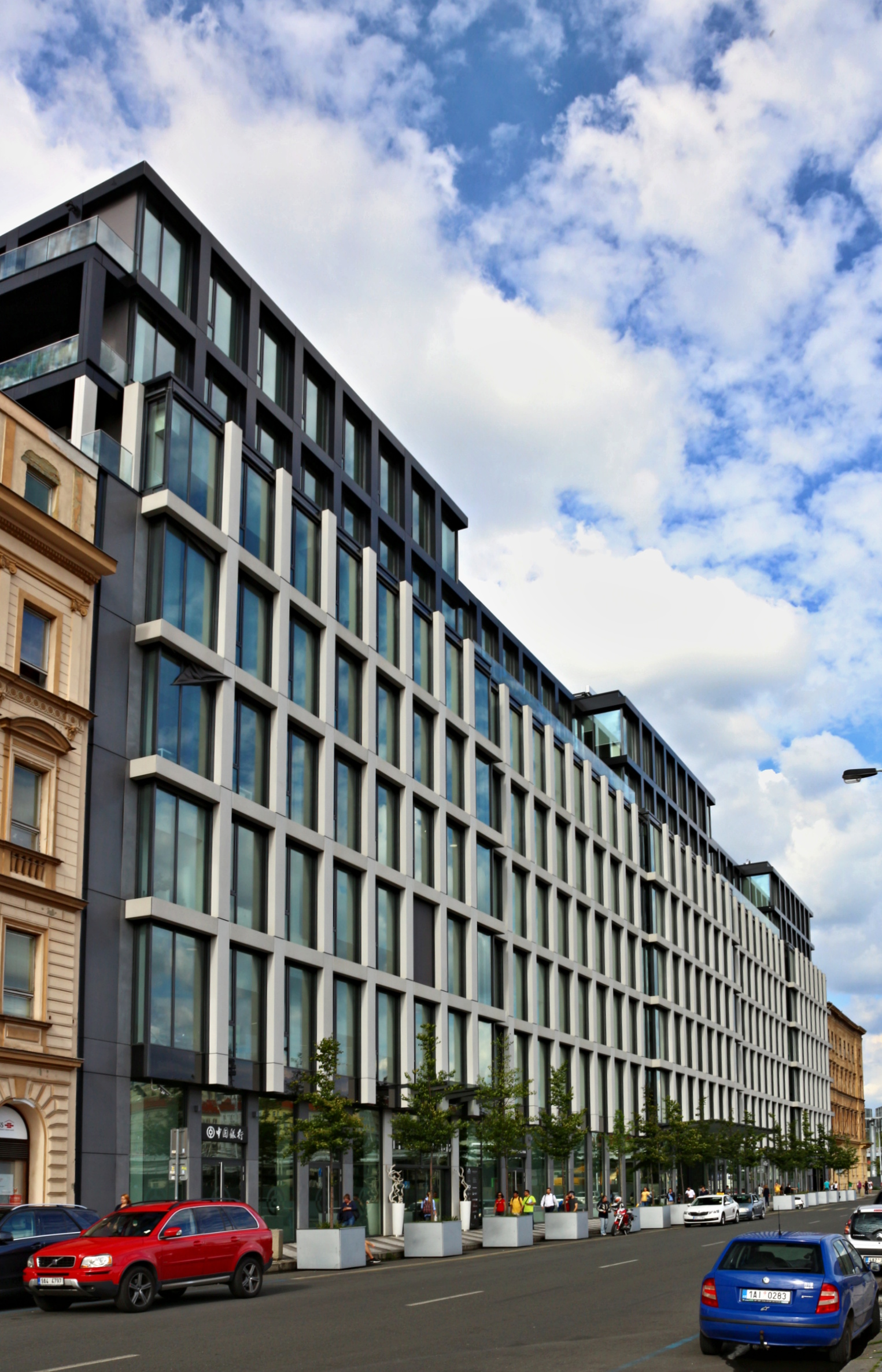 Praha pasáž Florentinum